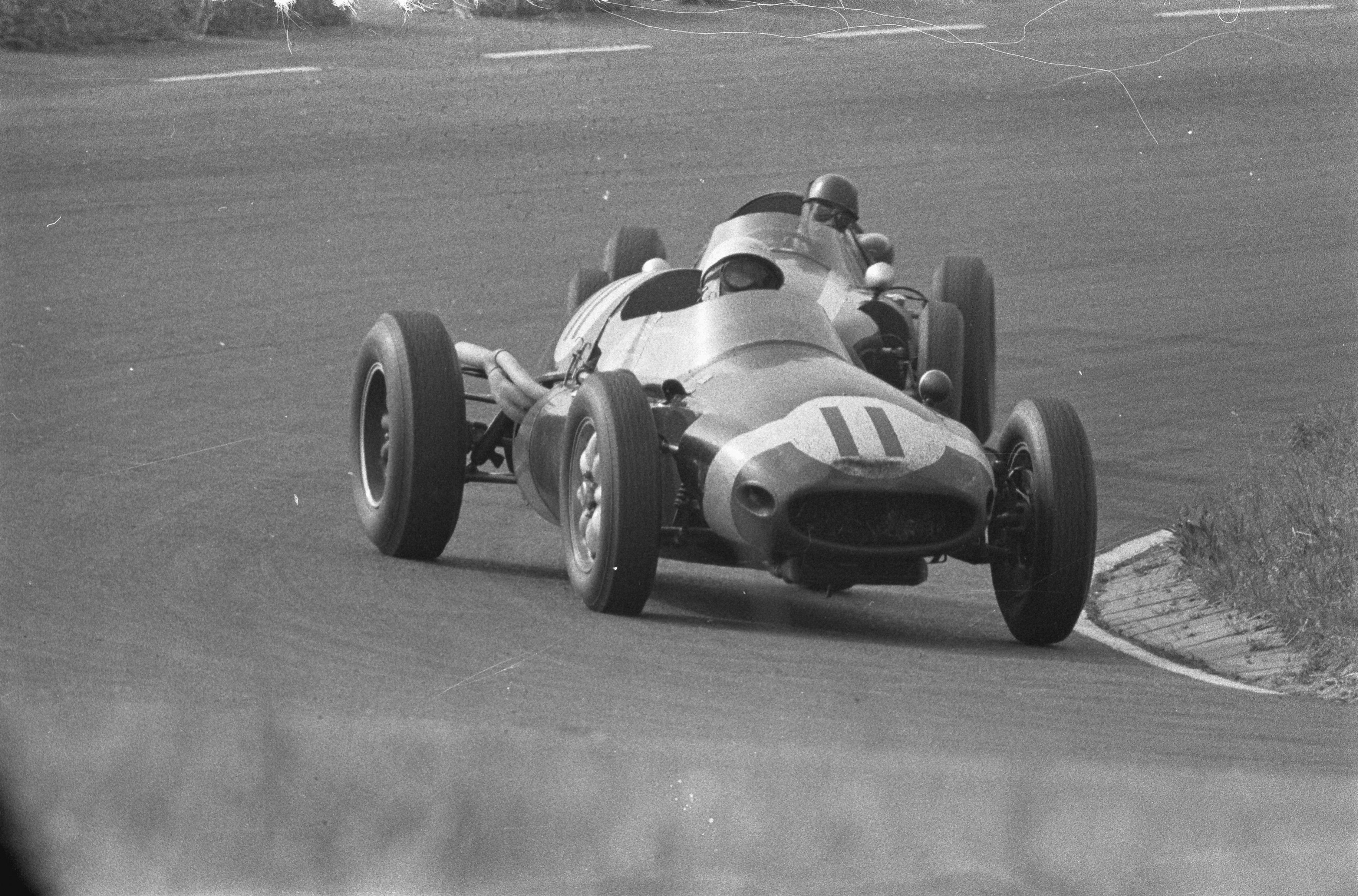 Collectie / Archief : Fotocollectie Anefo Reportage / Serie : [ onbekend ] Beschrijving : Autoraces op het circuit van Zandvoort van de Grand Prix Stirling Moss (no.11) terwijl hij de Zweed Bonnier passeert Datum : 31 mei 1959 Fotograaf : Pot, Harry / Anefo Auteursrechthebbende : Nationaal Archief Materiaalsoort : Negatief (zwart/wit) Nummer archiefinventaris : bekijk toegang 2.24.01.05 Bestanddeelnummer : 910-4129